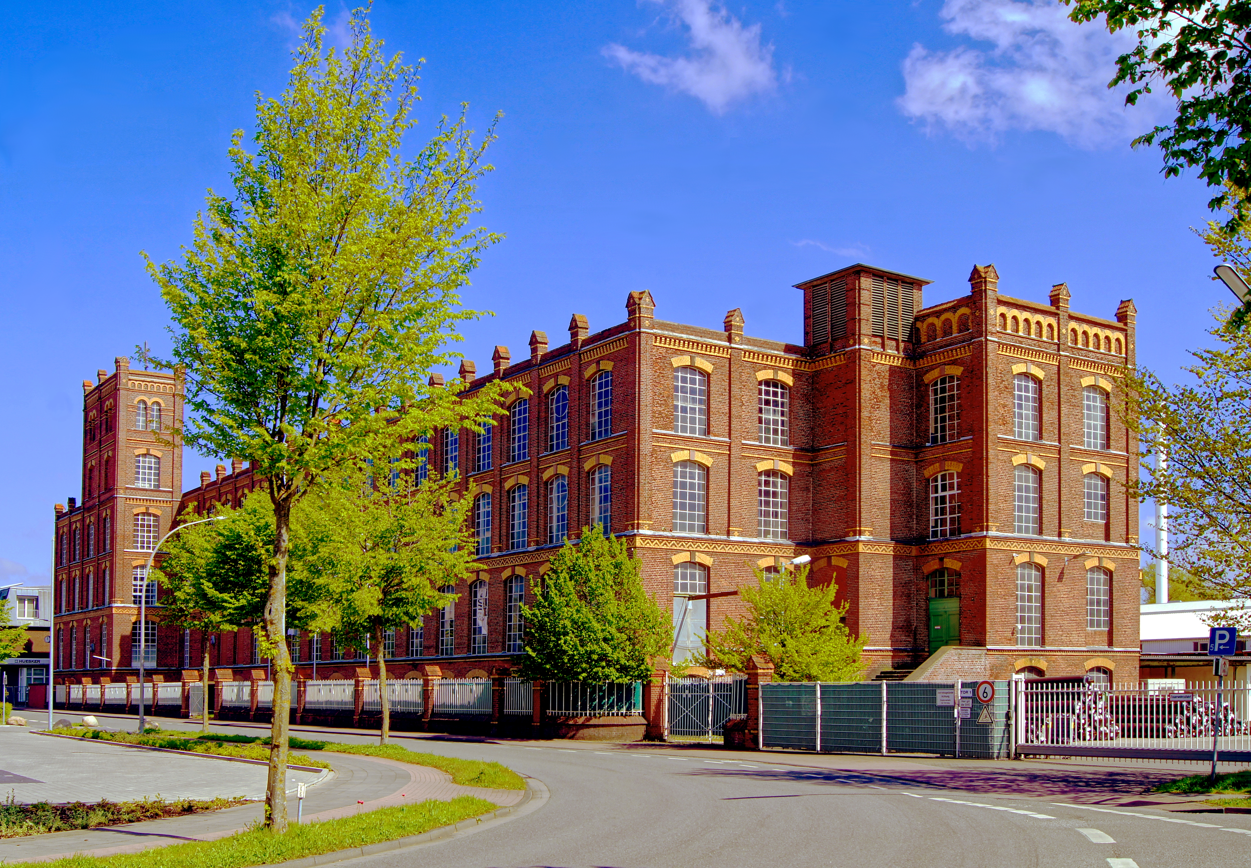 Das alte Spinnerei-Gebäude der Firma Huesker in der Fabrikstraße 13-15 in Gescher wurde in den Jahren 1905 bis 1909 errichtet. Das Schweizer Architekturbüro Sequin und Knobel aus Rüti ZH war für Planung und Ausführung verantwortlich.Das Gebäude wurde unter der Nummer 36 in die Denkmalliste der Stadt Gescher eingetragen. This is a photograph of an architectural monument.